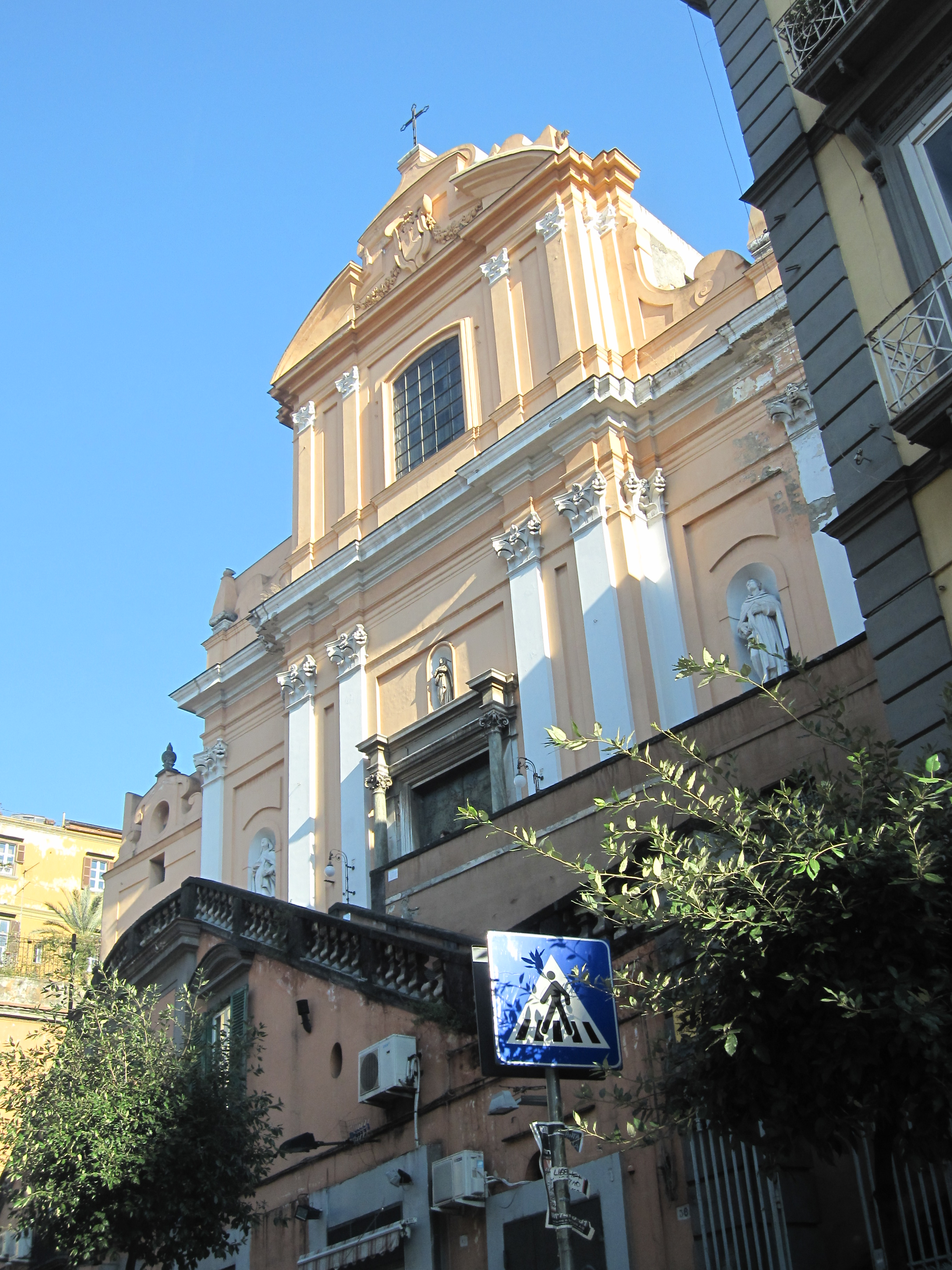 Chiesa di Santa Teresa degli Scalzi - Napoli